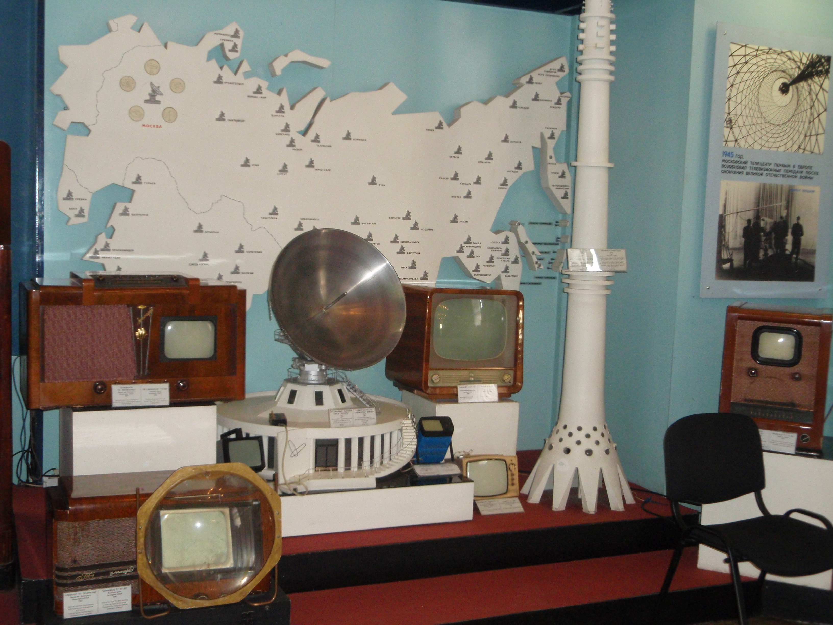 Фрагмент экспозиции, посвященной развитию телевидения. Политехнический музей.